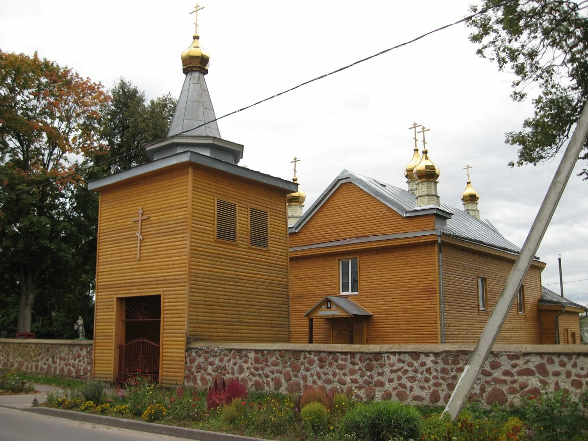 Трабы. Петрапаўлаўская царква